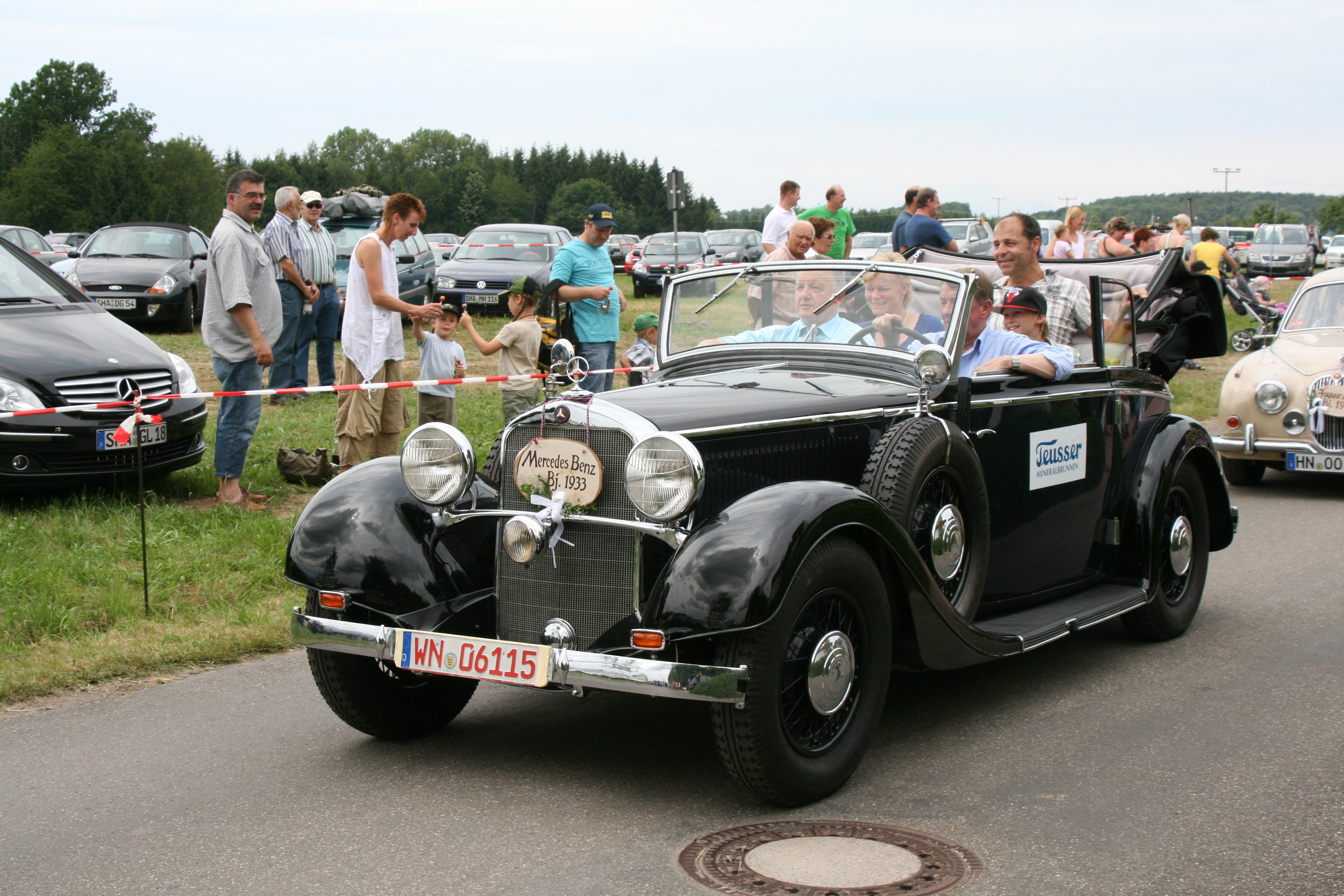 Festumzug zur 500-Jahr-Feier in Wüstenrot-Finsterrot mit über 1000 Teilnehmern aus Vereinen und Gruppen des Ortes Finsterrot, der Gemeinde Wüstenrot und der Nachbarschaft